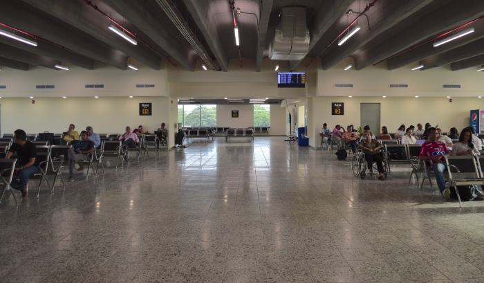 Salas 9, 10 y 11 renovadas del aeropuerto Ernesto Cortissoz